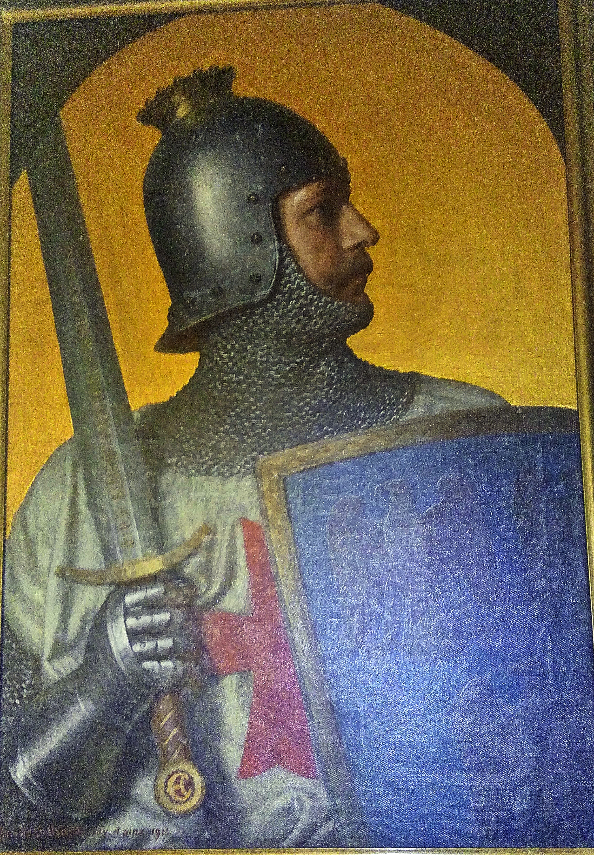 Graf August Reinhard zu Leiningen-Westerburg (1863-1929), porträtiert als Kreuzritter, von Guido Philipp Schmitt (1834-1922), Stadtmuseum Grünstadt